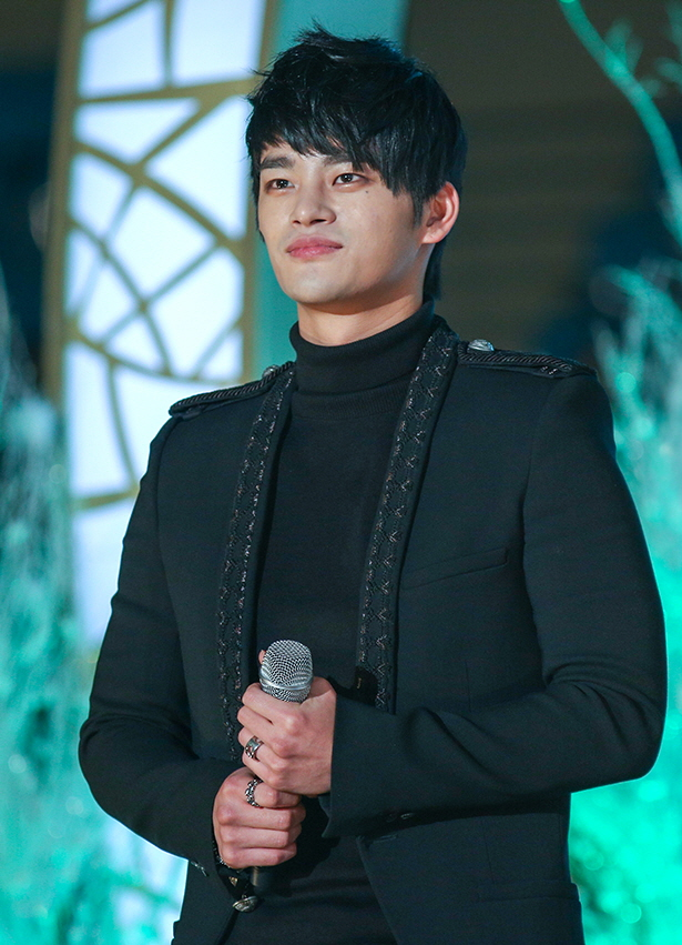 121214 멜론 어워드 서인국 직찍